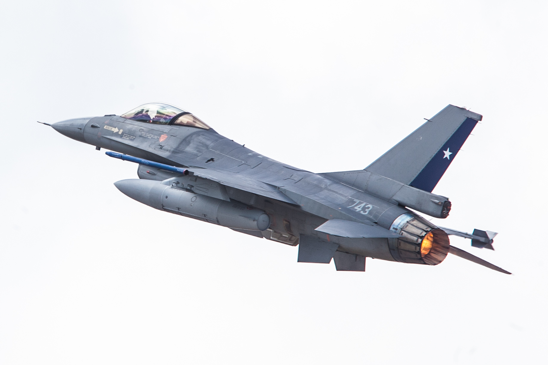 Fotos Felipe Barra/MD